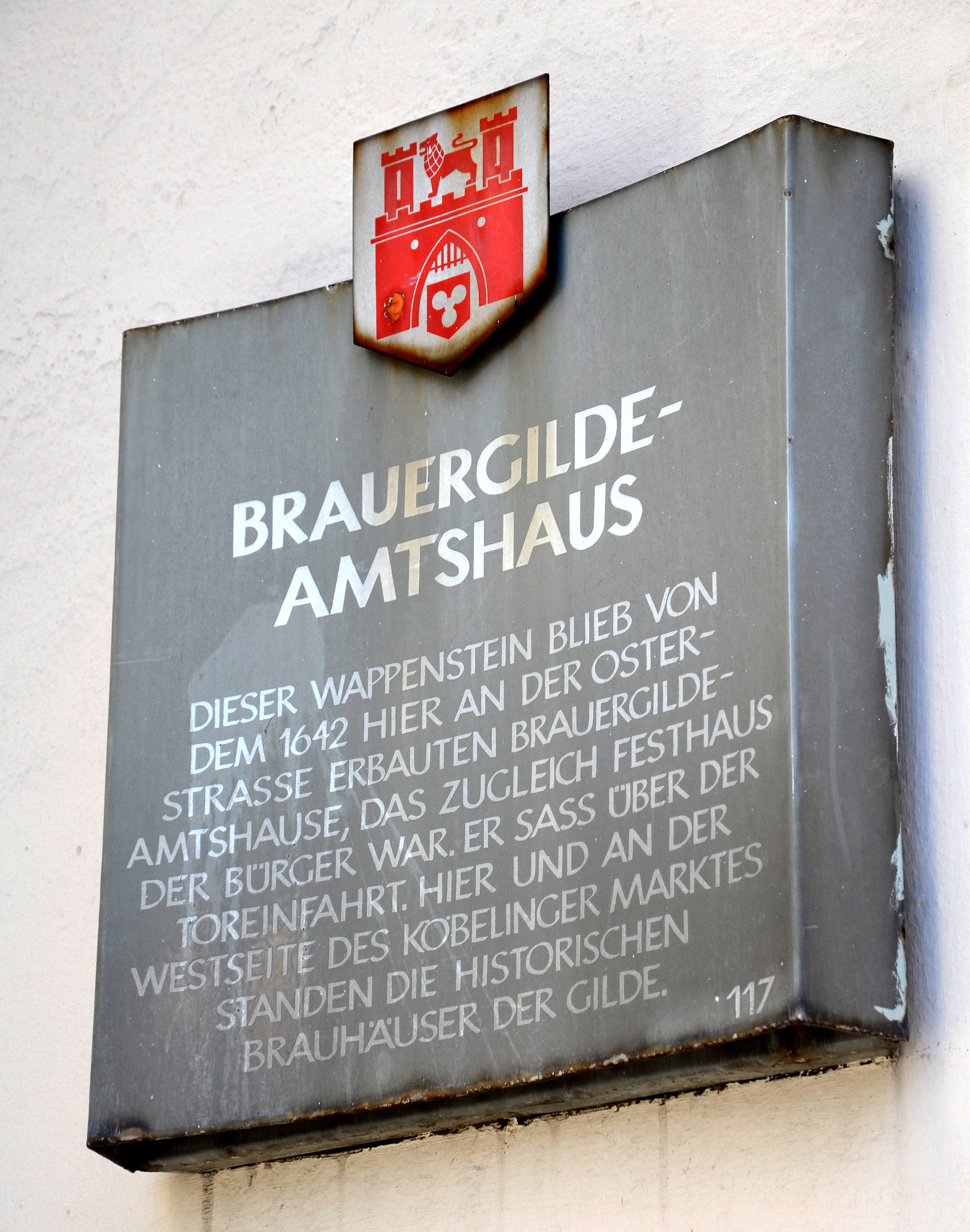 Am - denkmalgeschützten - Gebäude Osterstraße 30 in Hannover findet sich die Stadttafel Nummer 117 mit Bezugnahme auf das Nebengebäude mit der Hausnummer 28. Der Text lautet: „Brauergilde-Amtshaus / Dieser Wappenstein blieb von dem 1642 an der Osterstraße erbauten Brauergilde-Amtshause, das zugleich Festhaus der Bürger war. Er sass über der Toreinfahrt. Hier und an der Westseite des Köbelinger Marktes standen die historischen Brauhäuser der Gilde.“ ...